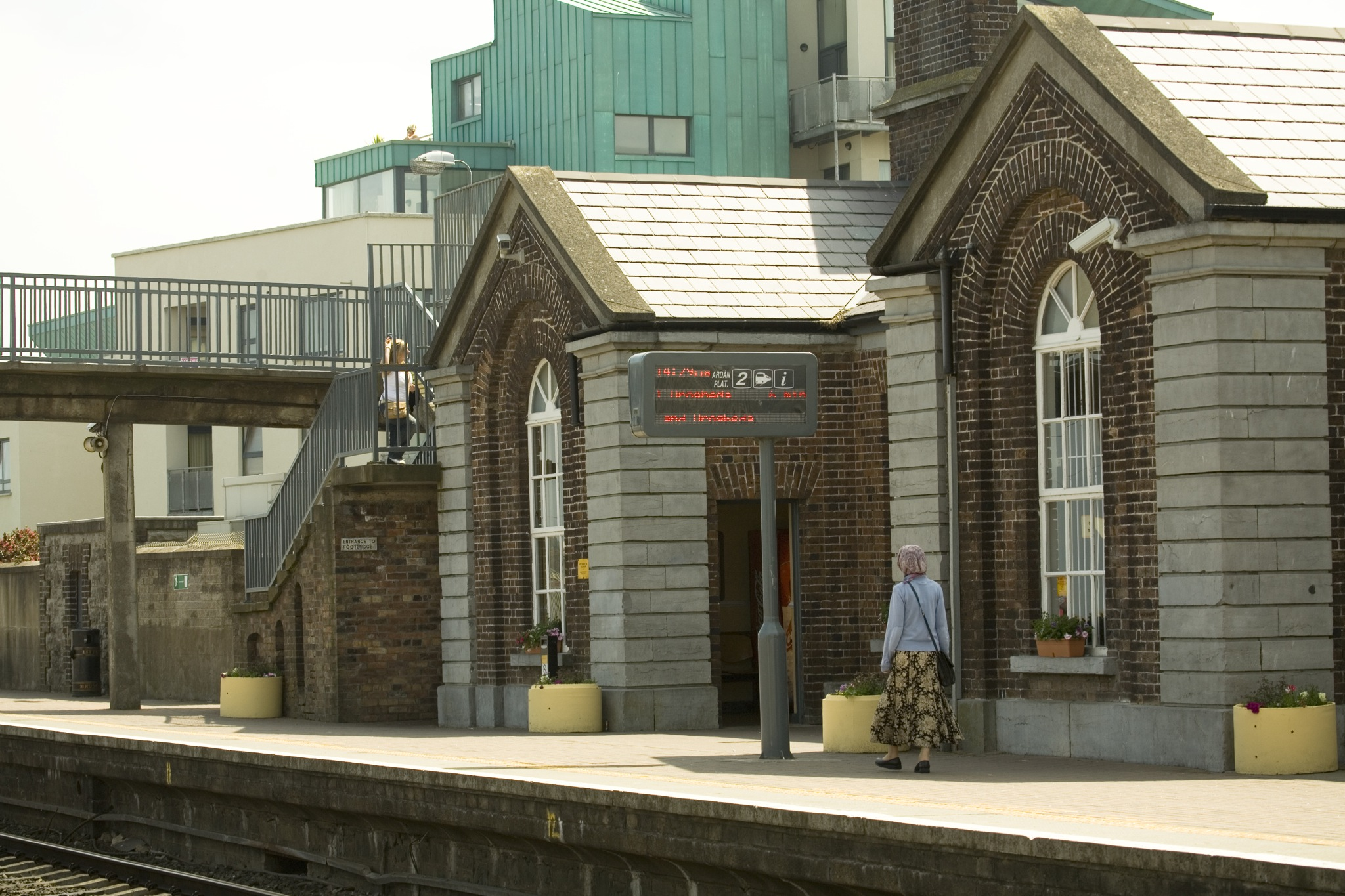 Центральная часть станции Балбригган и здание станции.